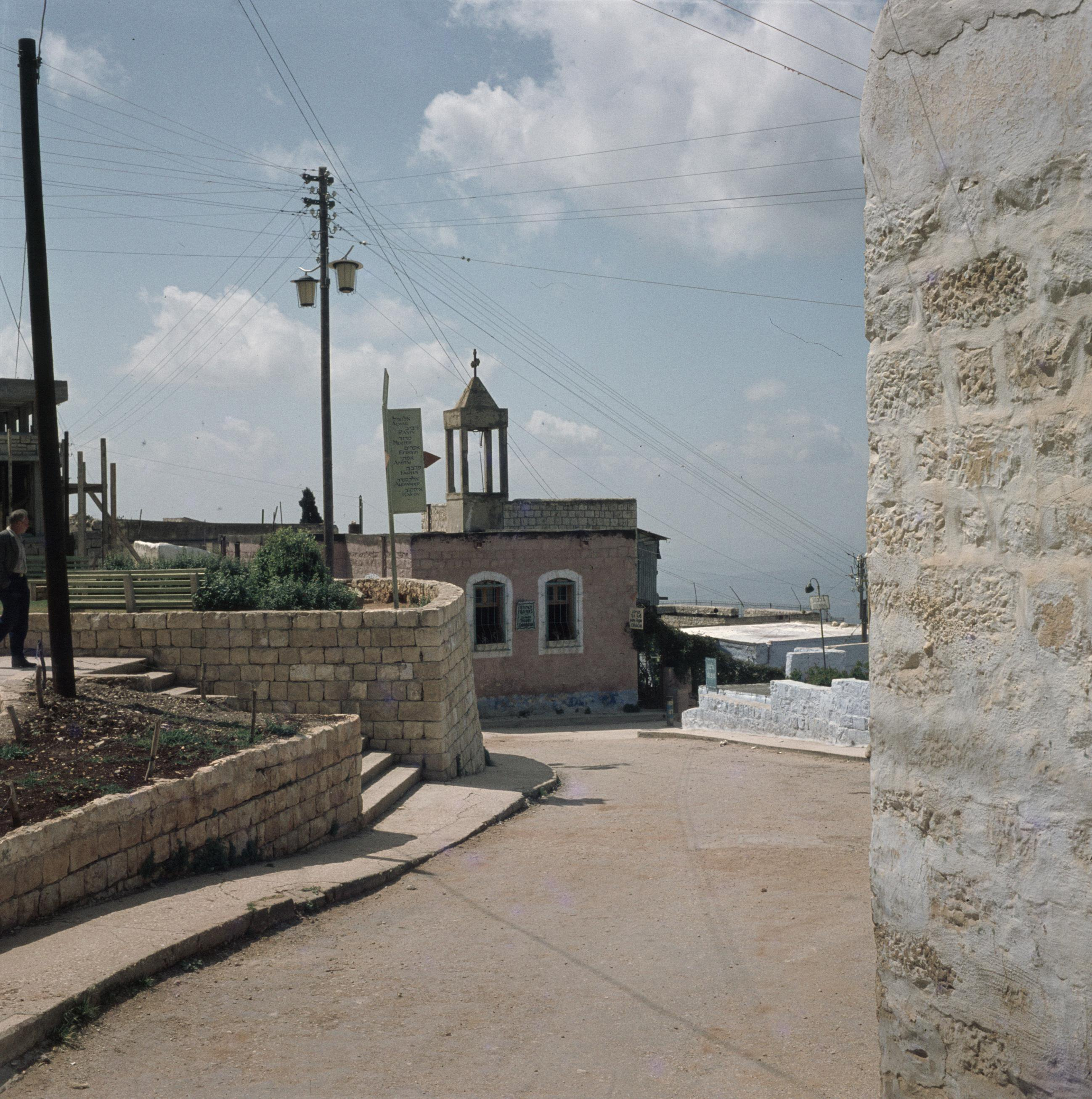 Collectie / Archief : Fotocollectie Van de Poll Reportage / Serie : [ onbekend ] Beschrijving : Safad. Kunstenaarskolonie: straatje met zicht op het altelier van Sionah Tagger en een kapel met torentje. In de tuin rechts van het midden naast een lichtmast een informatiebord met de namen van kunstenaars Datum : 1 januari 1964 Locatie : Israël, Safad Trefwoorden : ateliers, christendom, kunstenaarskolonies, naamborden, straatbeelden, straatverlichting, trappen Persoonsnaam : Tagger, Sionah Fotograaf : Poll, Willem van de, [onbekend] Auteursrechthebbende : Nationaal Archief Materiaalsoort : Negatief (zwart/wit) Nummer archiefinventaris : bekijk toegang 2.24.14.02 Bestanddeelnummer : 255-9269